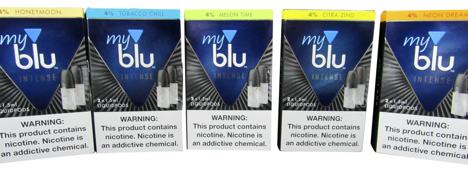 Blu flavor packs